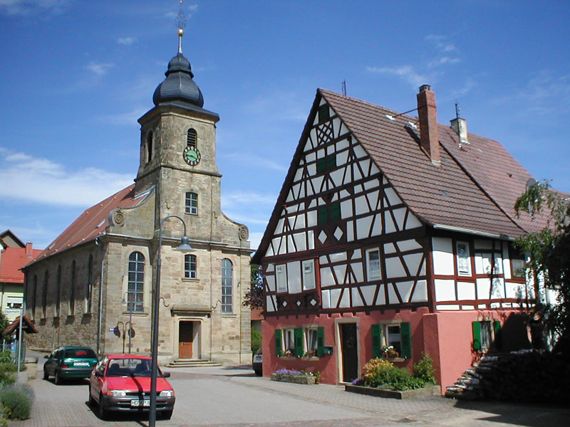 Szene in der Ortsmitte von Sinsheim-Weiler mit Kirche und Fachwerkhaus von 1607